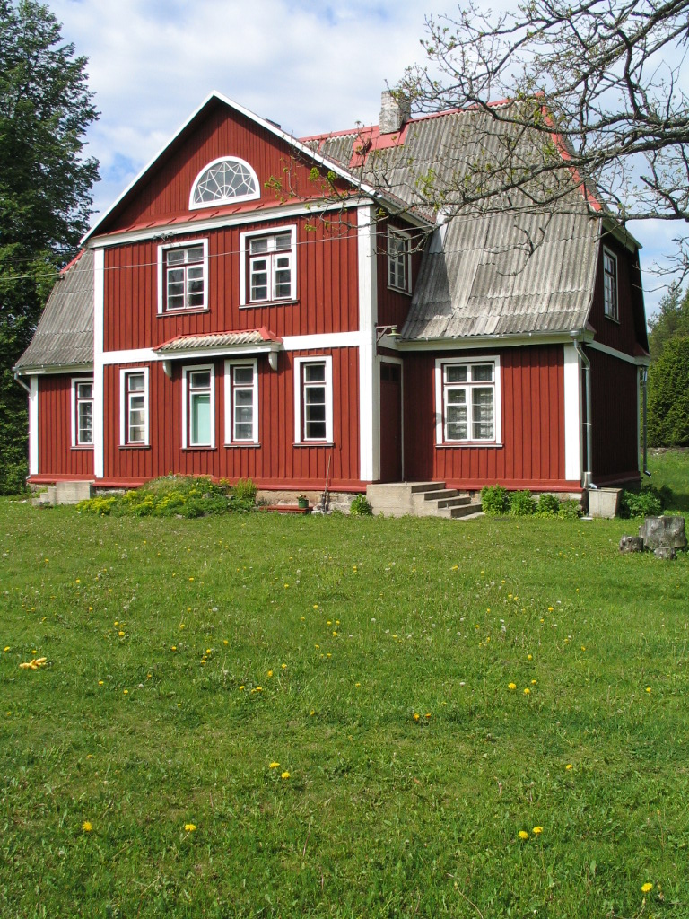 Kõnnu jaamahoone